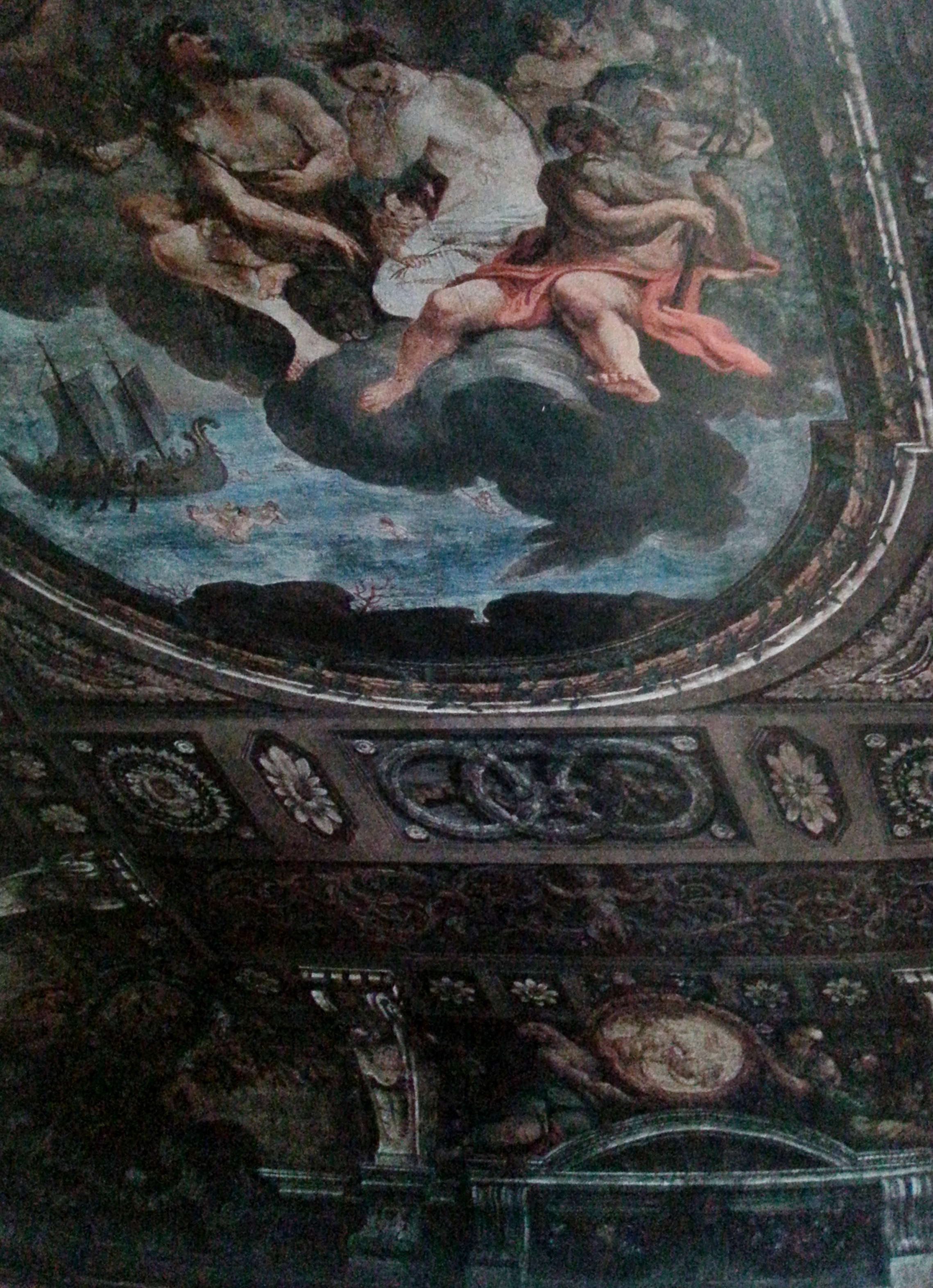 Mola di Bari, Palazzo Roberti Alberotanza: interno, tela dell'artista napoletano Aniello d'Arminio.